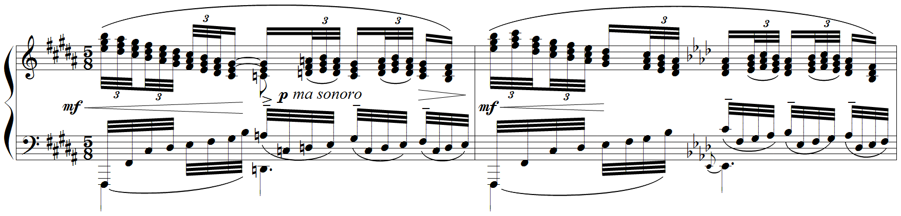 Debussy - Etude "pour les agréments", mes.35-36